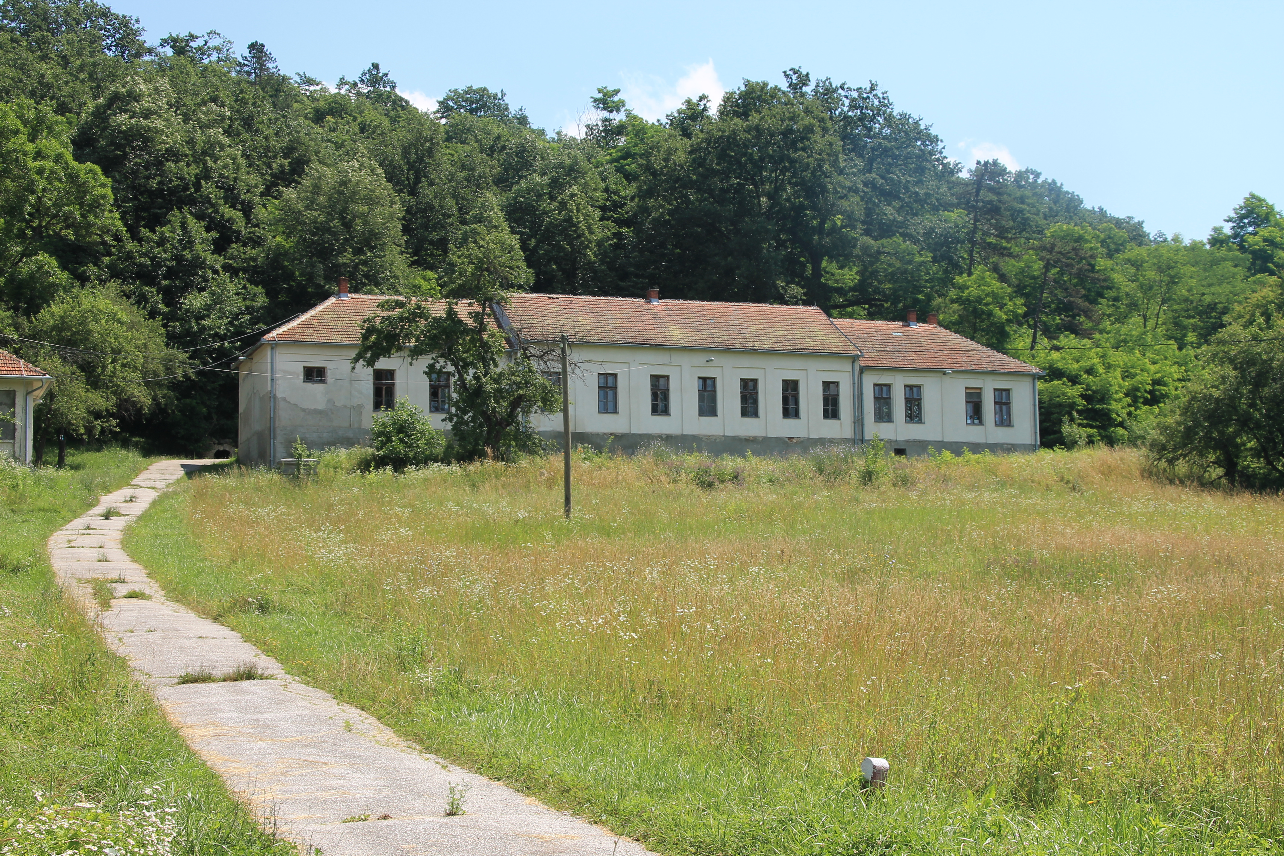 Šarani (Gornji Milanovac)